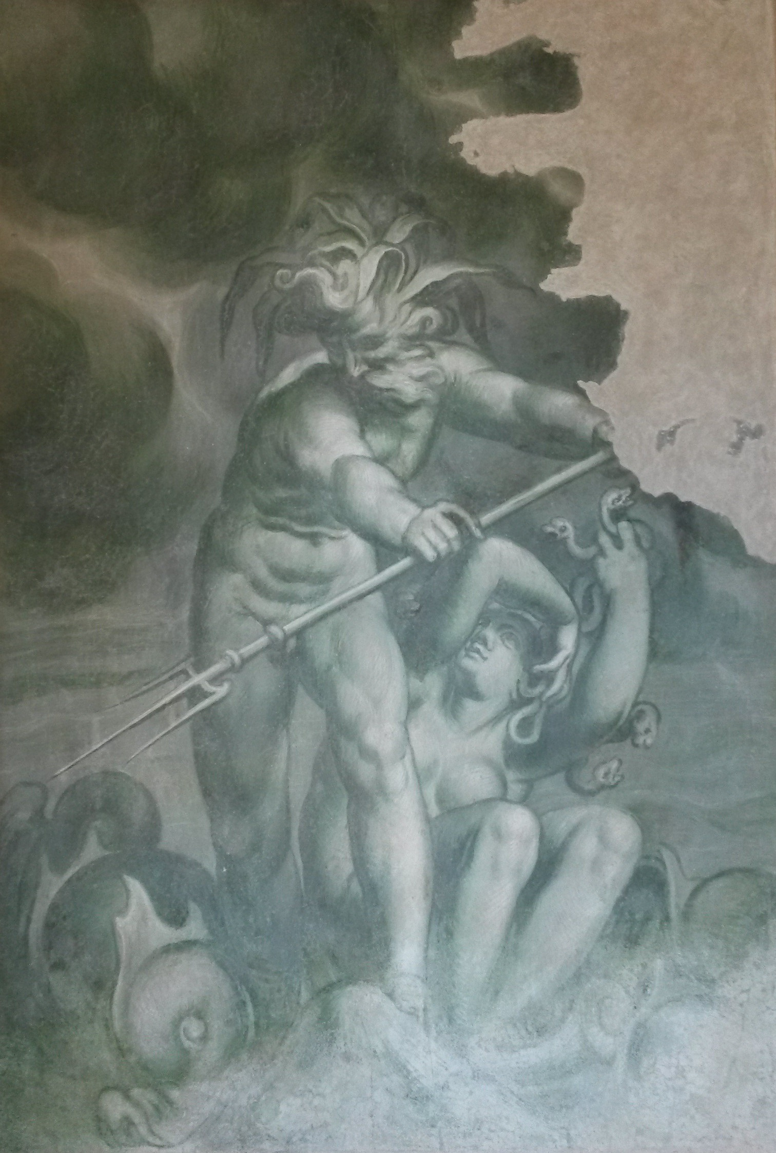 Paolo Farinati, "Nettuno con la Medusa", 1590 circa, affresco (restaurato nel 2016). Il dio del mare, Nettuno, imbraccia il tridente; accanto sta la Medusa dalla chioma serpentata.